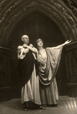 Voinovich Géza: Magyar passió. Társulat: Nemzeti Színház, Budapest. Bemutató: 1931.03.27. Rendező: Hevesi Sándor. Szereplők: Pilátus: Palágyi Lajos, Pilátus felesége: Hettyey Aranka.